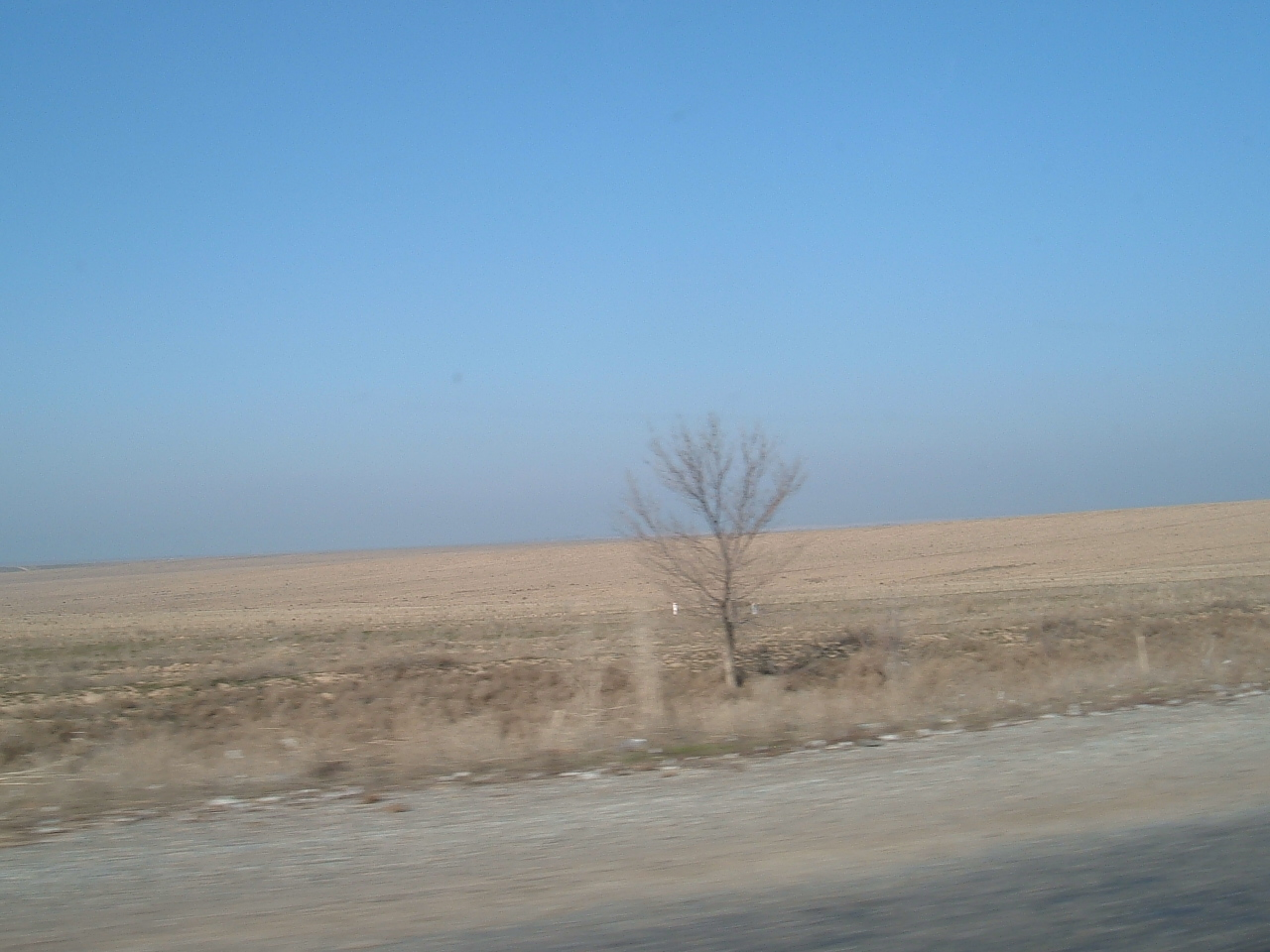 Steppan í Kasakstan